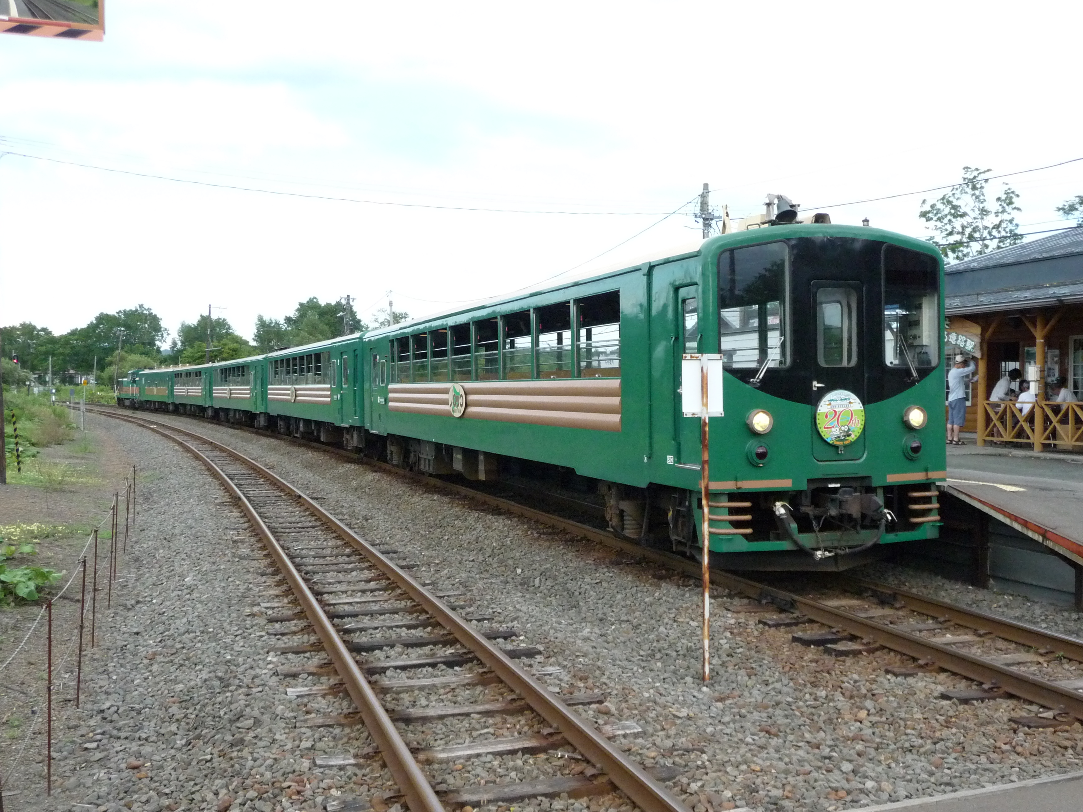 JR北海道塘路駅で停車中の『釧路湿原ノロッコ号』 ノロッコ号20周年記念のヘッドマーク付き